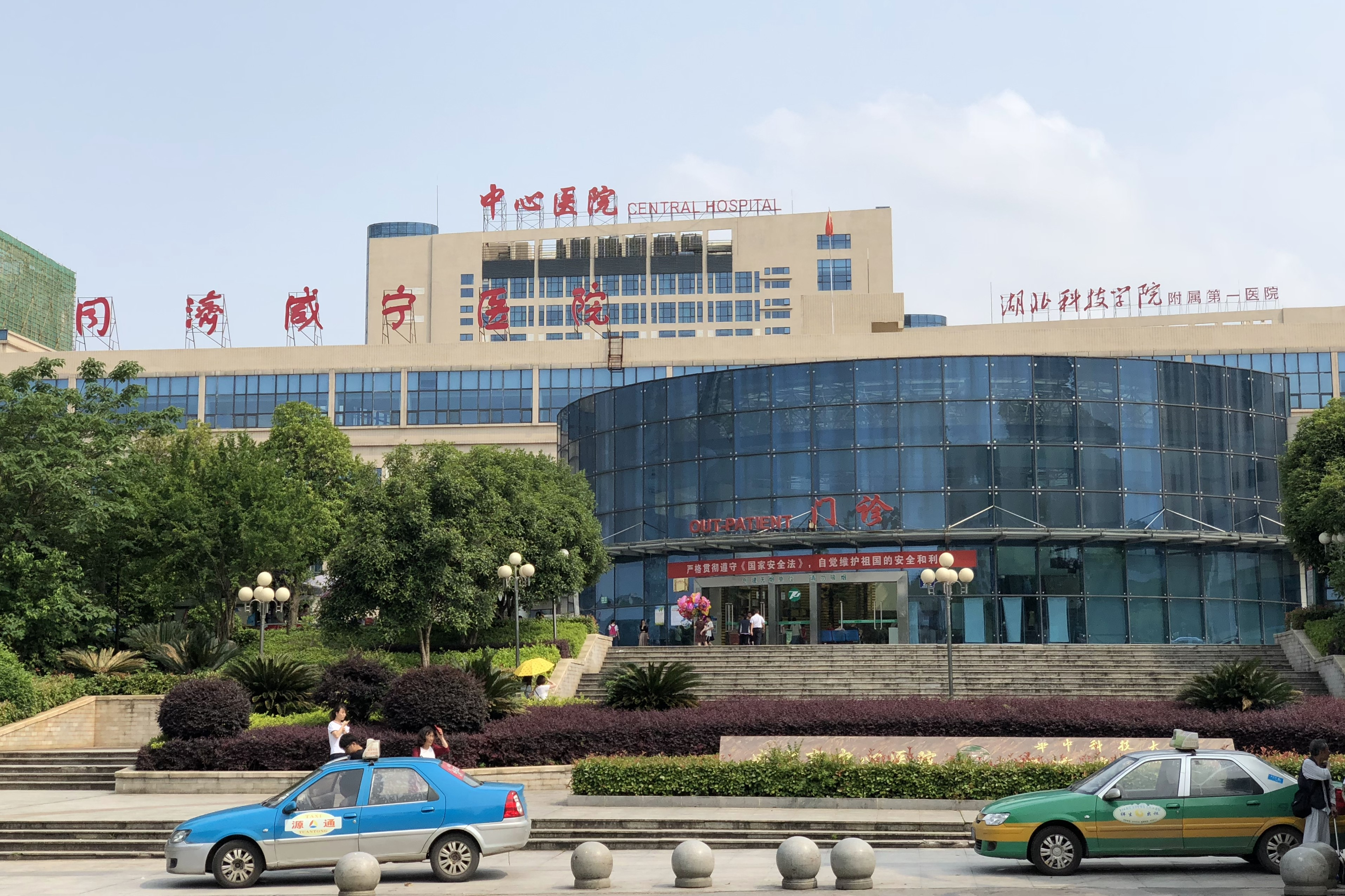 中文（中国大陆）: 同济咸宁医院